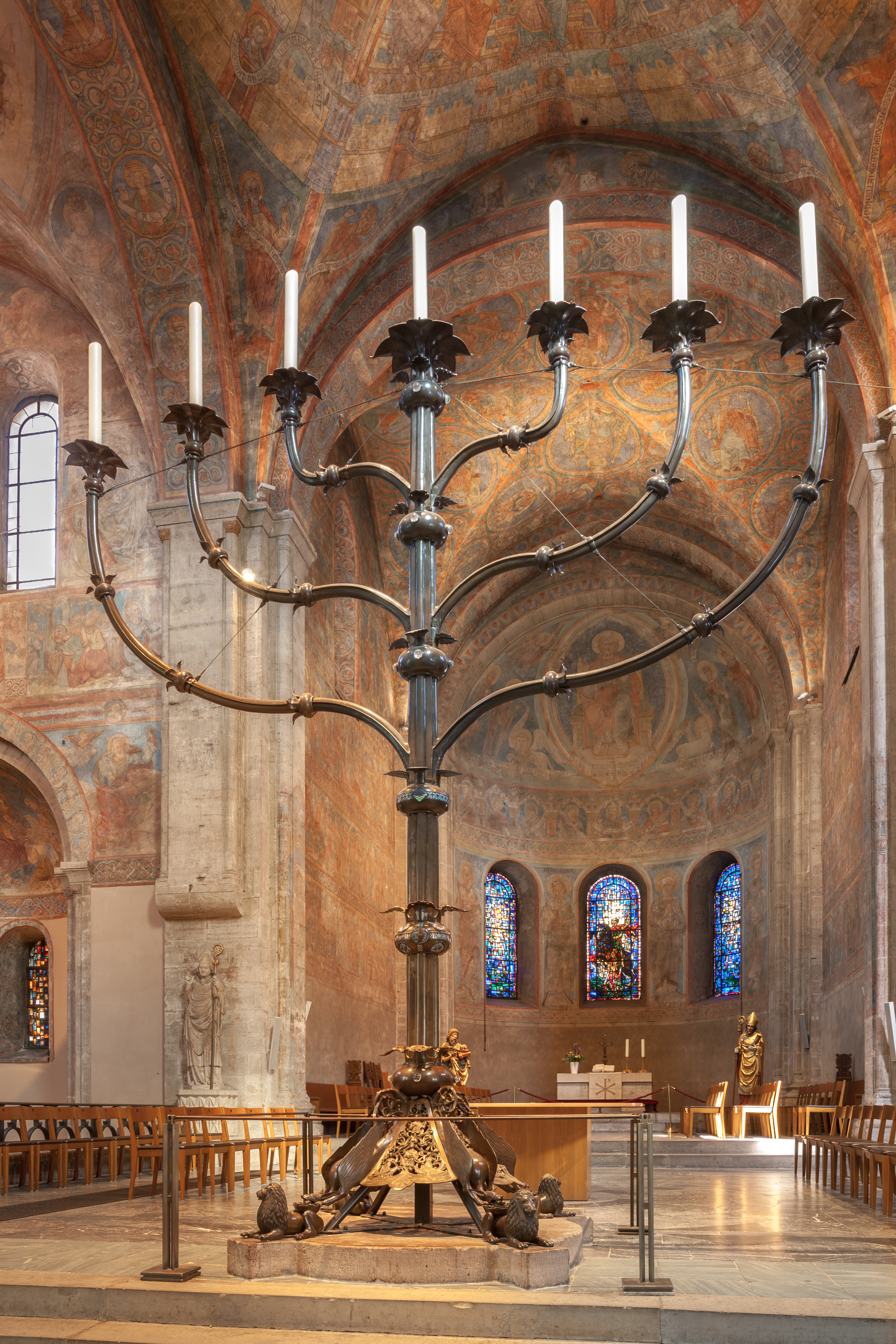 Braunschweiger Dom, Siebenarmiger Leuchter, Niedersachsen/Deutschland